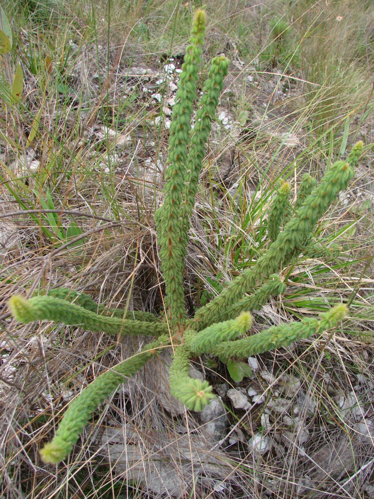 Mimosa virgula Barneby - FABACEAE - Parque Estadual da Serra dos Pirineus - Pirenópolis - Goiás - Brasil.